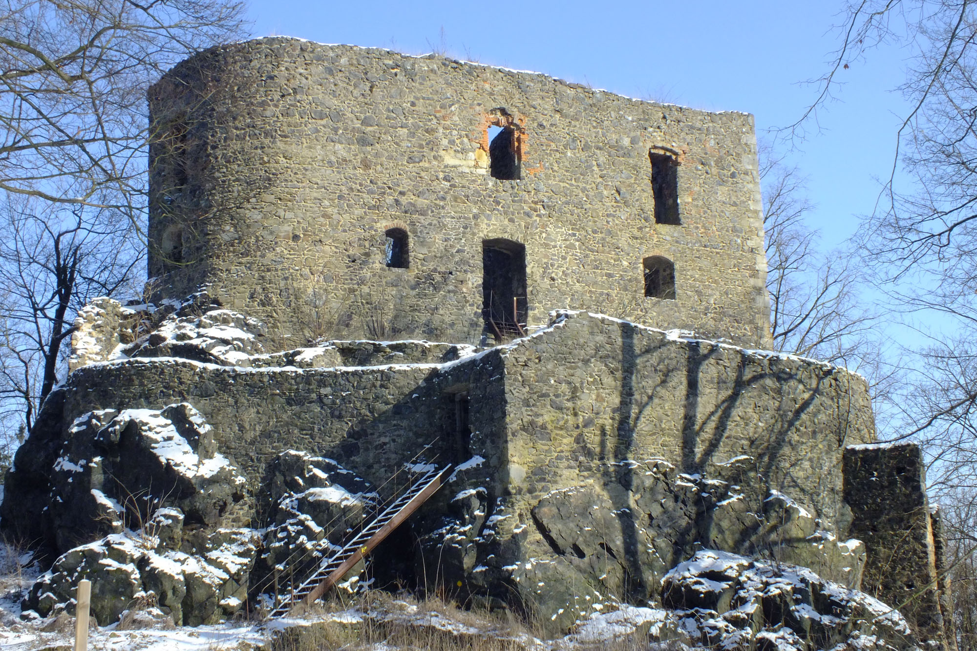 Zřícenina hradu Vlčtejn